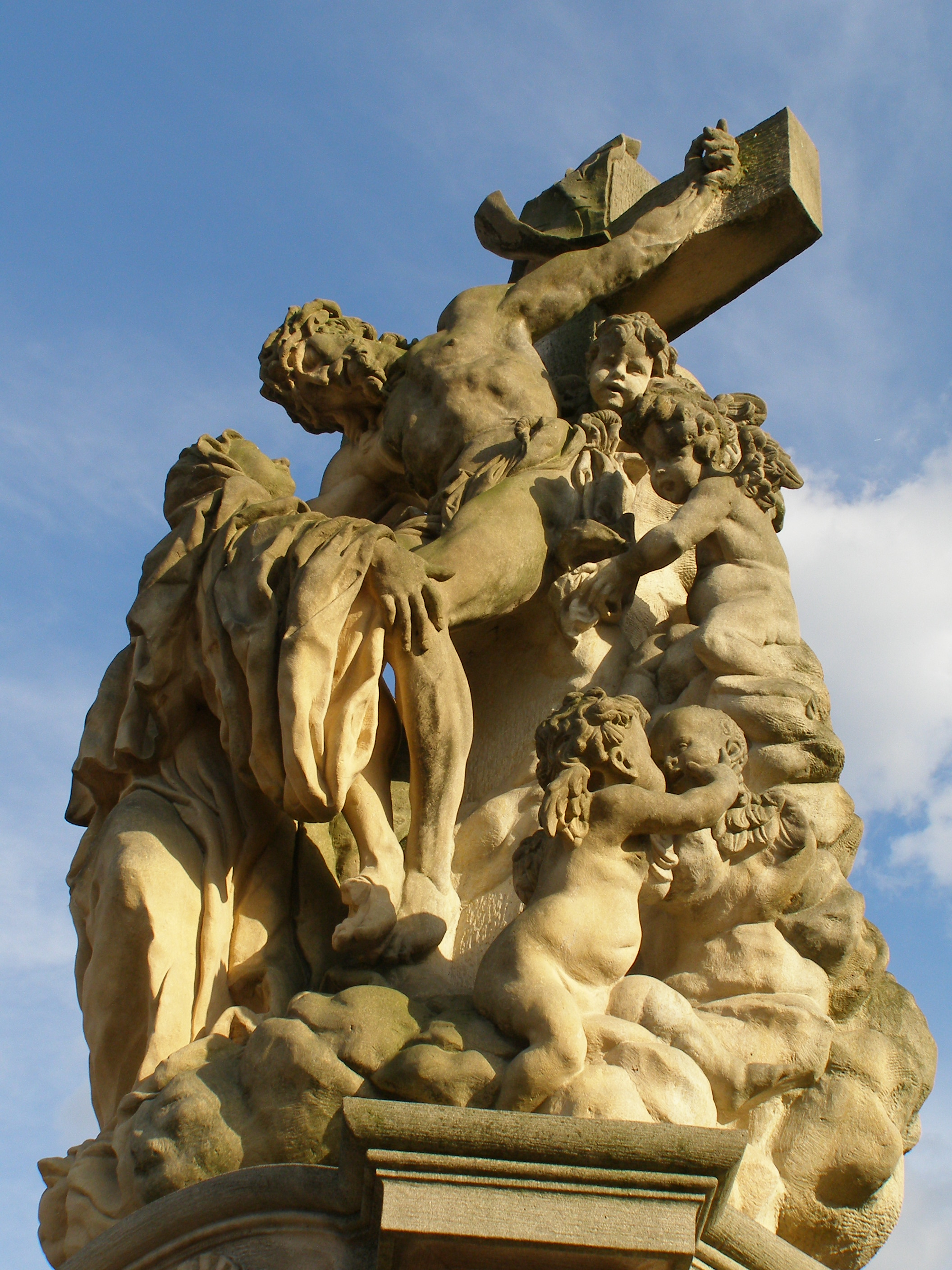 Karlův most, Staré Město a Malá Strana, mezi Křižovnickým náměstím a Mosteckou